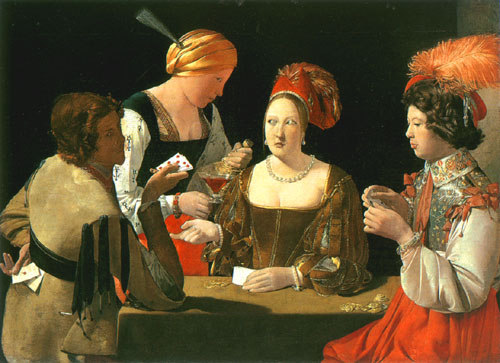 Gemälde um 1630 Andere Versionen: :commons:Image:Georges de La Tour 025.jpg